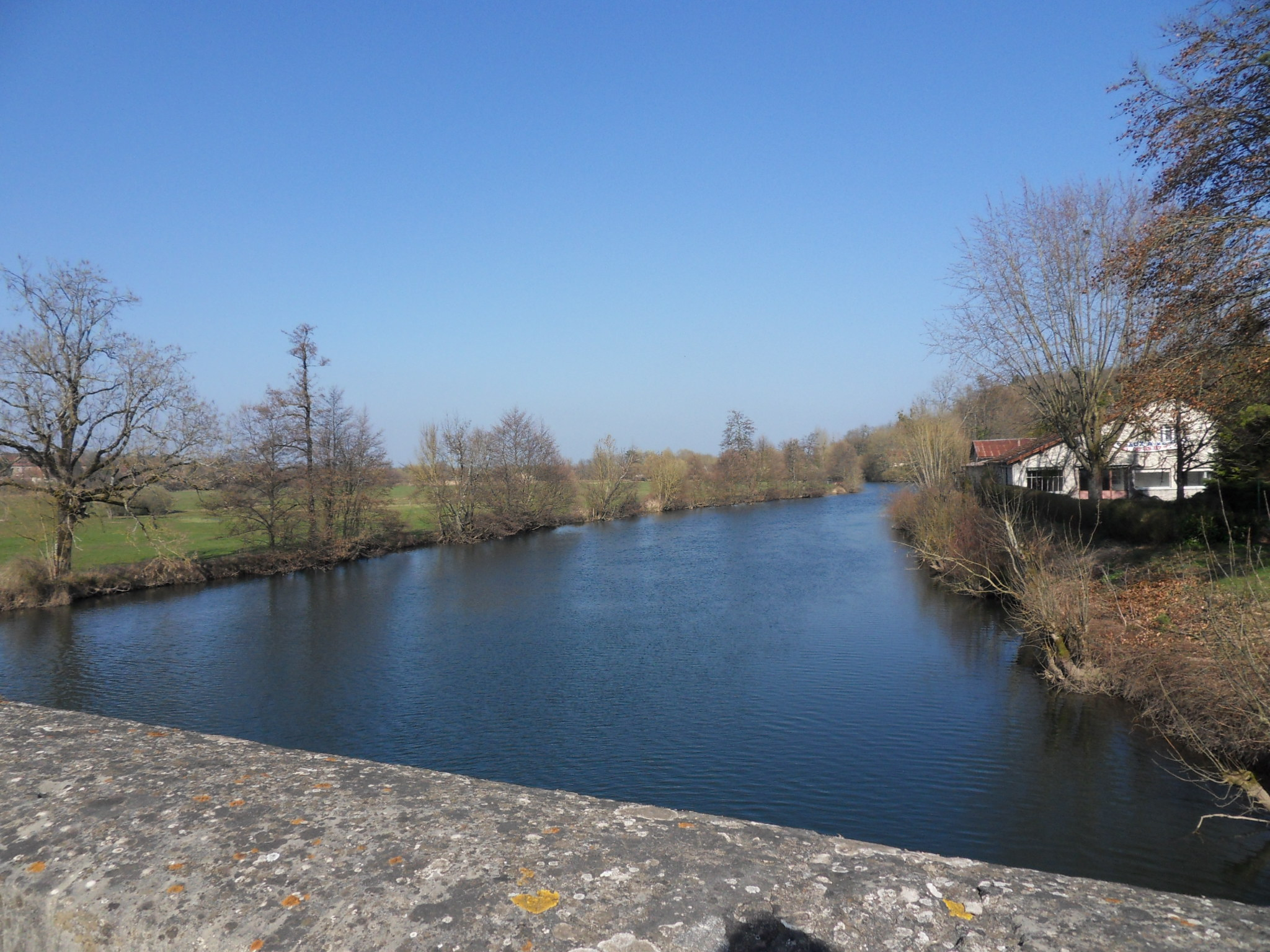 Faverney (Haute-Saône) - La Lanterne (Rivière). Vue depuis le pont des Bénédictins. Vue en amont du pont